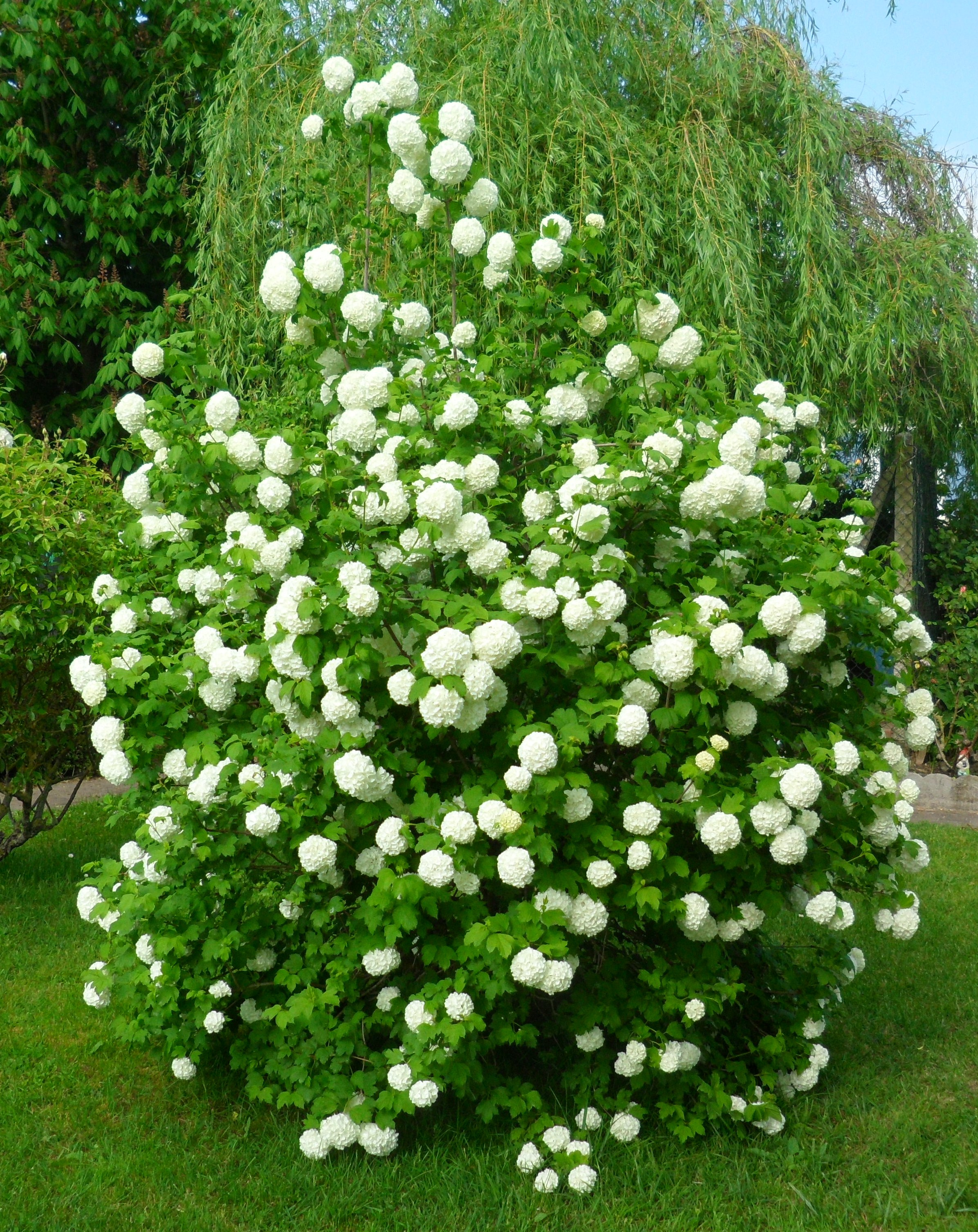 viorne obier